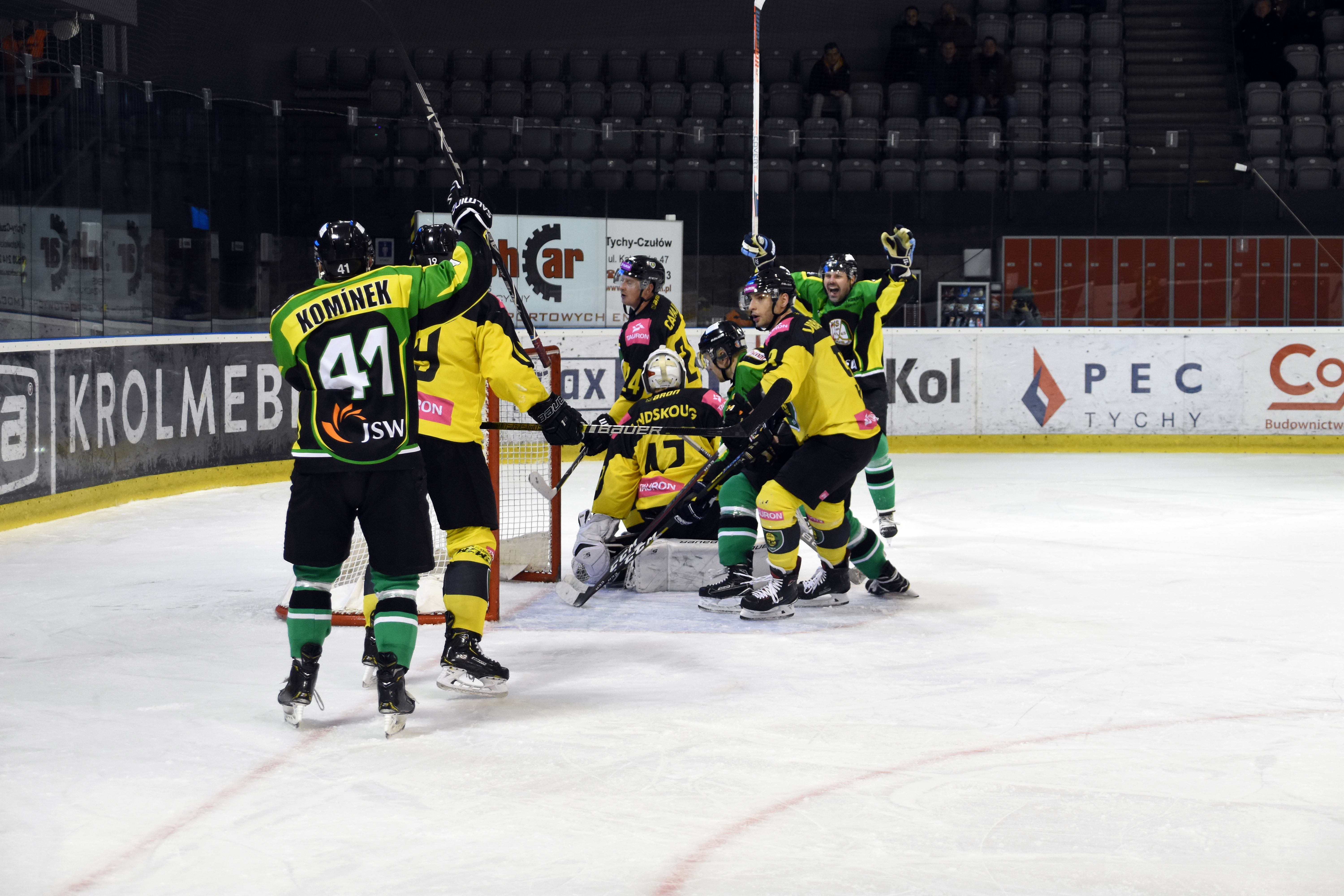 PP GKS Katowice - JKH Jastrzębie